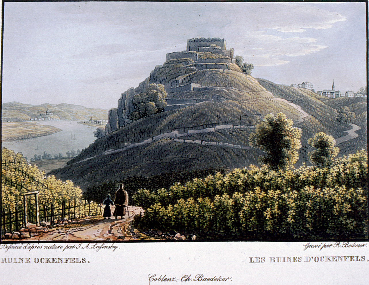 Altkolorierter Aquatintastich von R. Bodmer nach Vorlage von J. A. Lasinsky